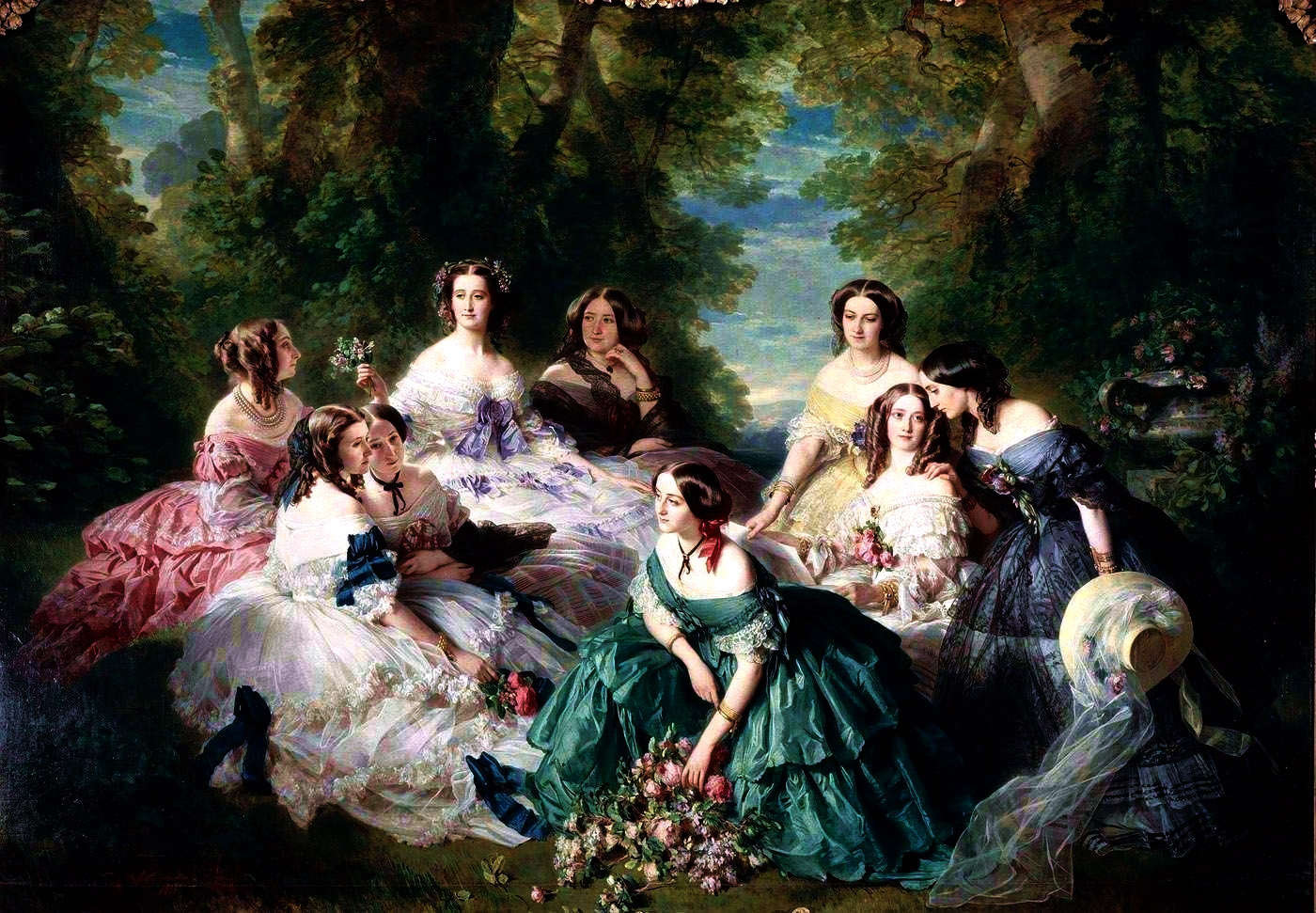 Portrait collectif avec l'impératrice Eugénie de Montijo, la baronne de Pierres, la princesse d'Essling, la vicomtesse de Lezay-Marnésia, la marquise de Montebello, la duchesse de Bassano, la baronne de Malaret, la marquise de Las Marismas et la marquise de Latour-Maubourg